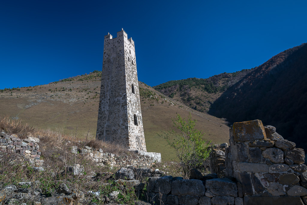 Башня в древнем ингушском поселении Бялган (Джейрахский район, Ингушетия)